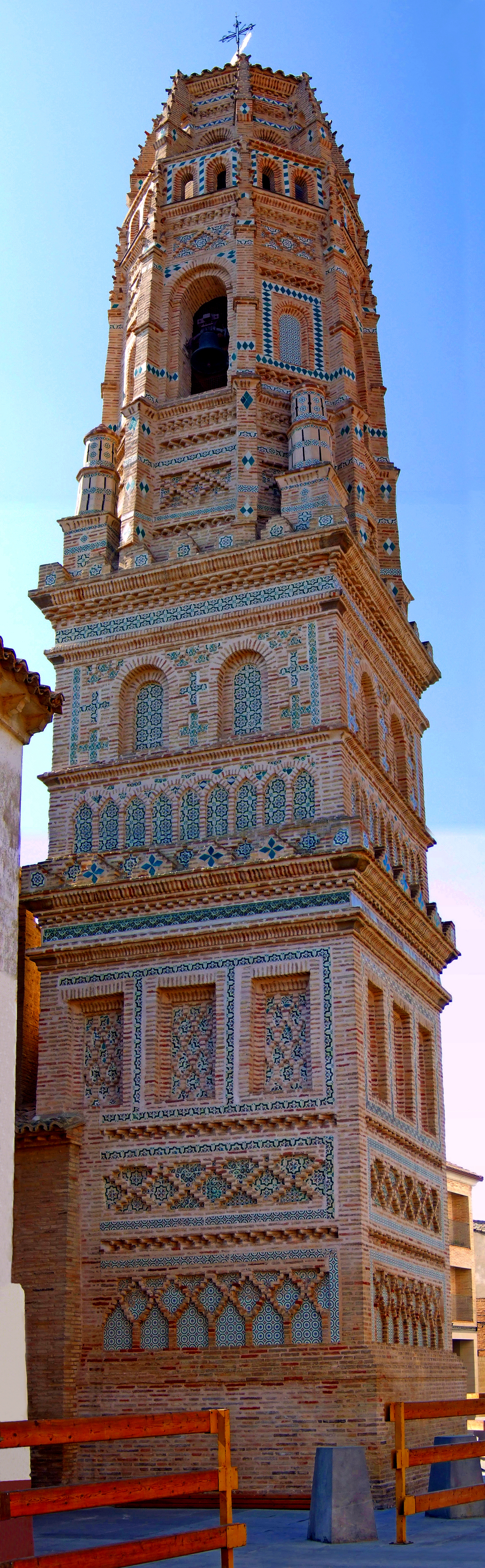 Torre de la iglesia de Utebo (Zaragoza)